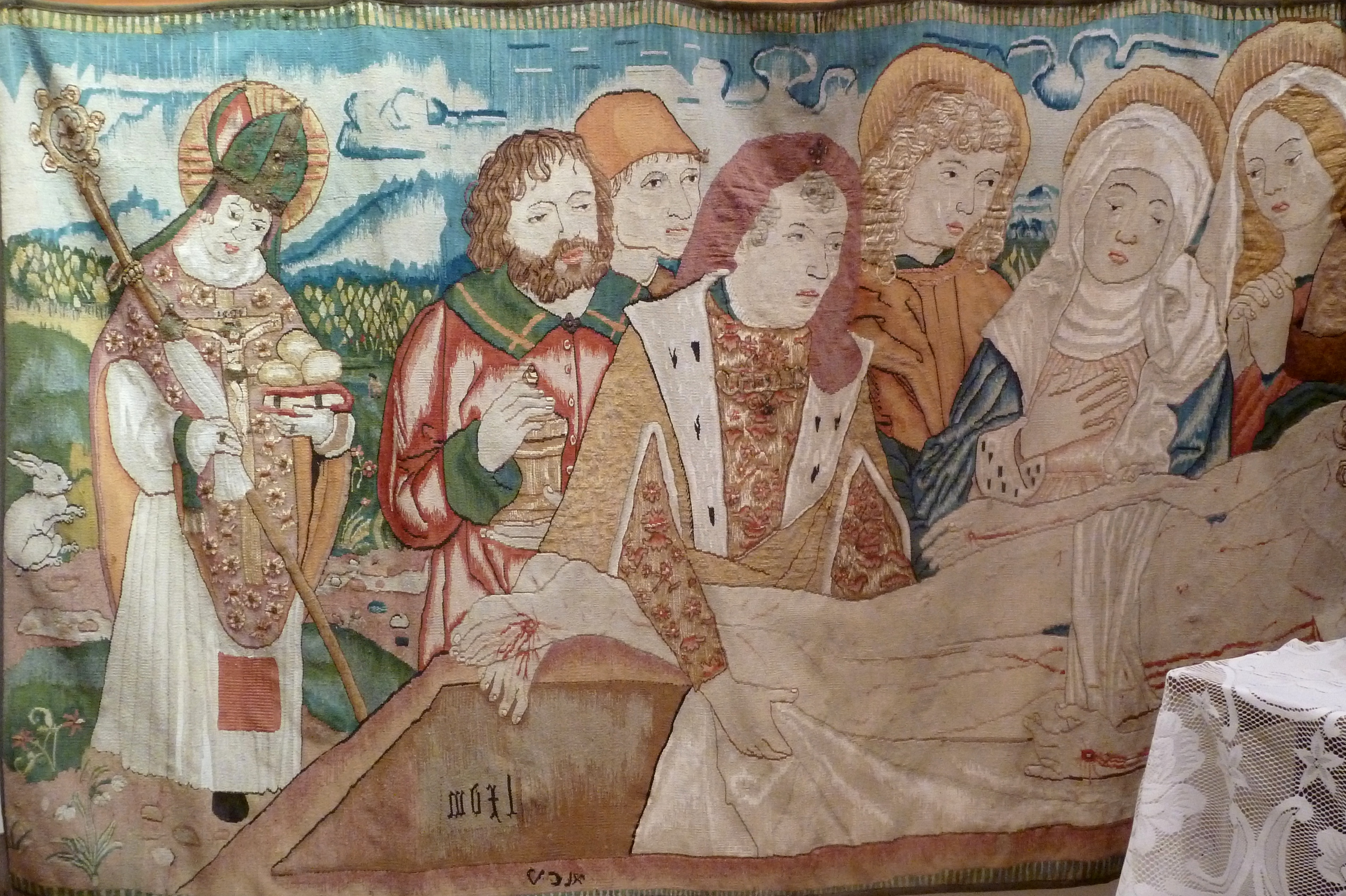 Tapisserie dite «mise au tombeau» à Saint-Jean-Saverne.